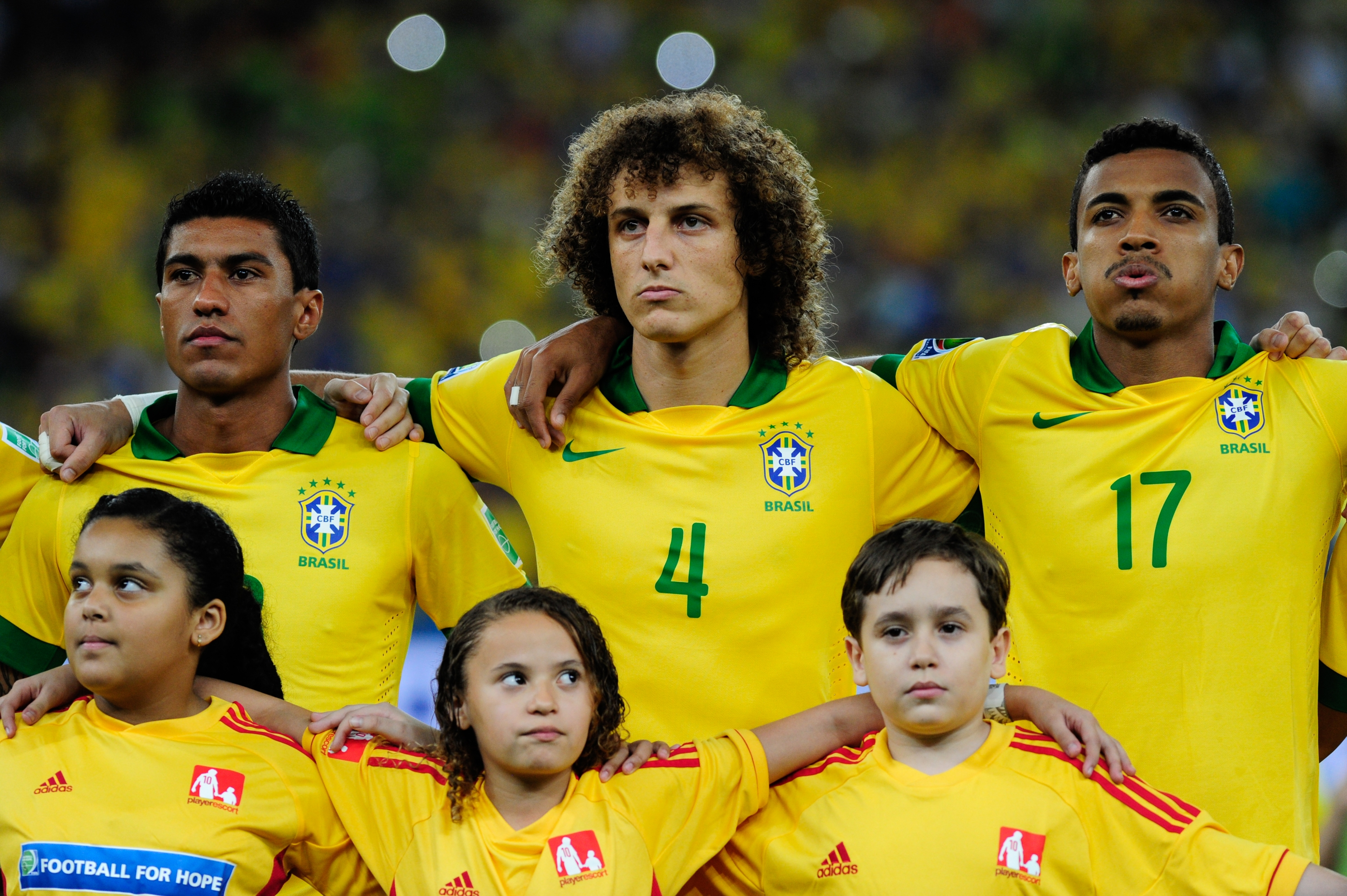 No Estádio do Maracanã, Brasil e Espanha disputam a taça da Copa das Confederações de 2013.